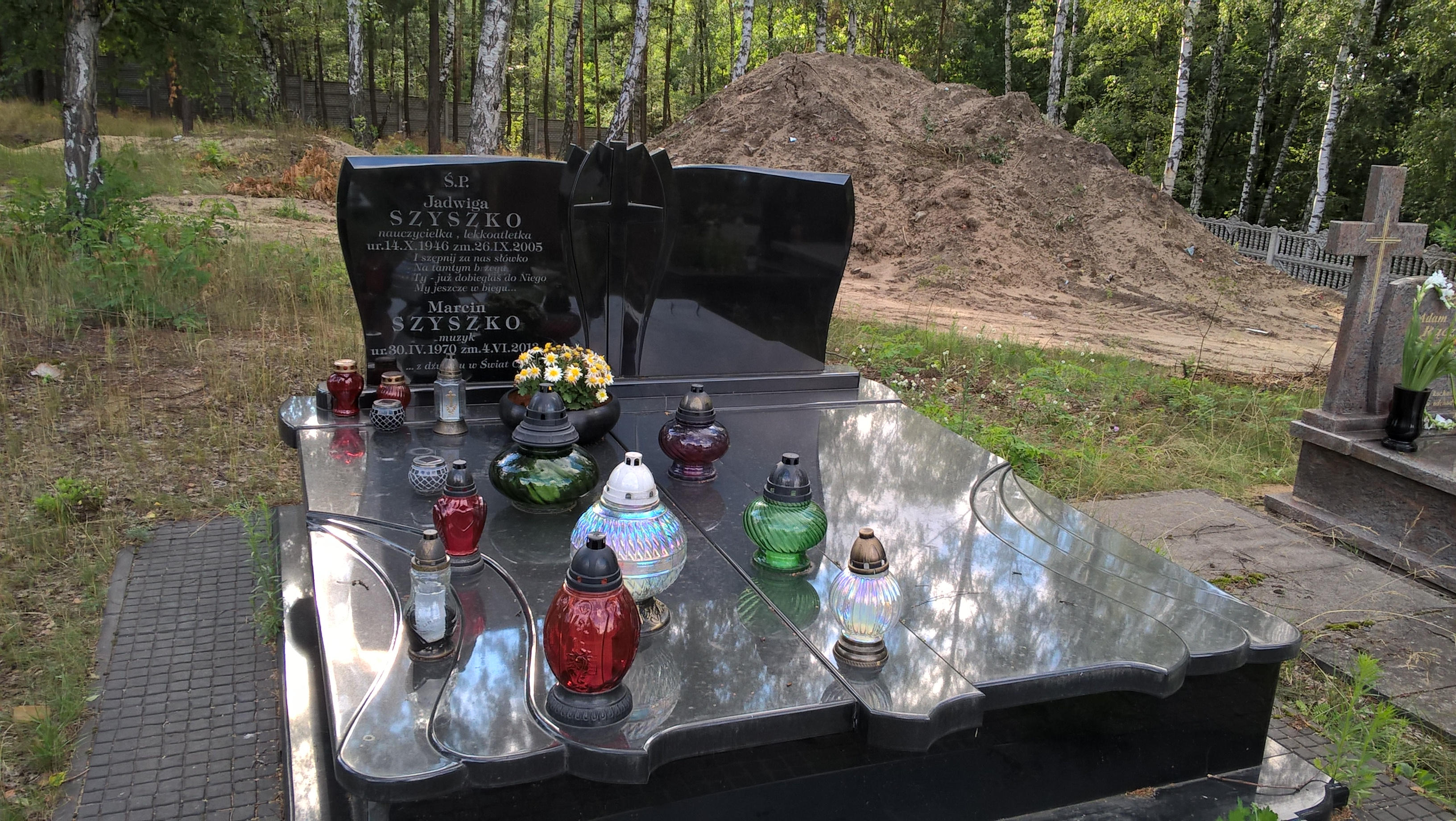 Grób Jadwigi i Marcina Szyszków na cmentarzu w Starej Miłosnej